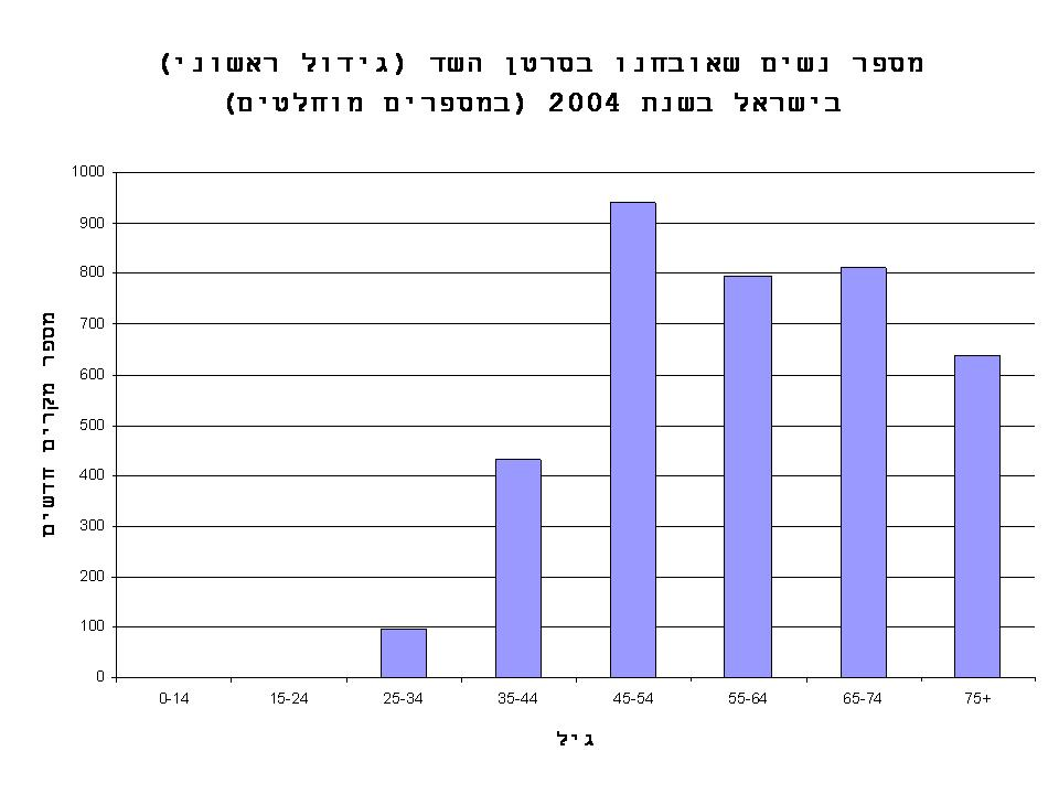 מספר החולות בסרטן השד שאובחנו לראשונה בישראל בשנת 2004, מסווגות על פי קבוצות גיל. על פי נתוני הלשכה המרכזית לסטטיסטיקה בישראל, שנתון 2006, טבלה 6.13.